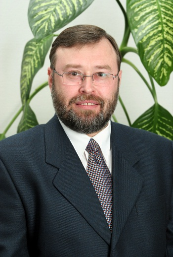 Eesti ajakirjanik, riigiametnik, teadlane ja ärijuht